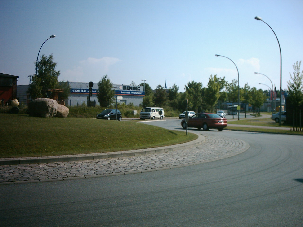 Kreisel in der Kehdinger Vorstadt in Stade